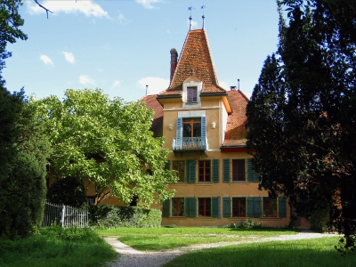 von Rütte-Gut